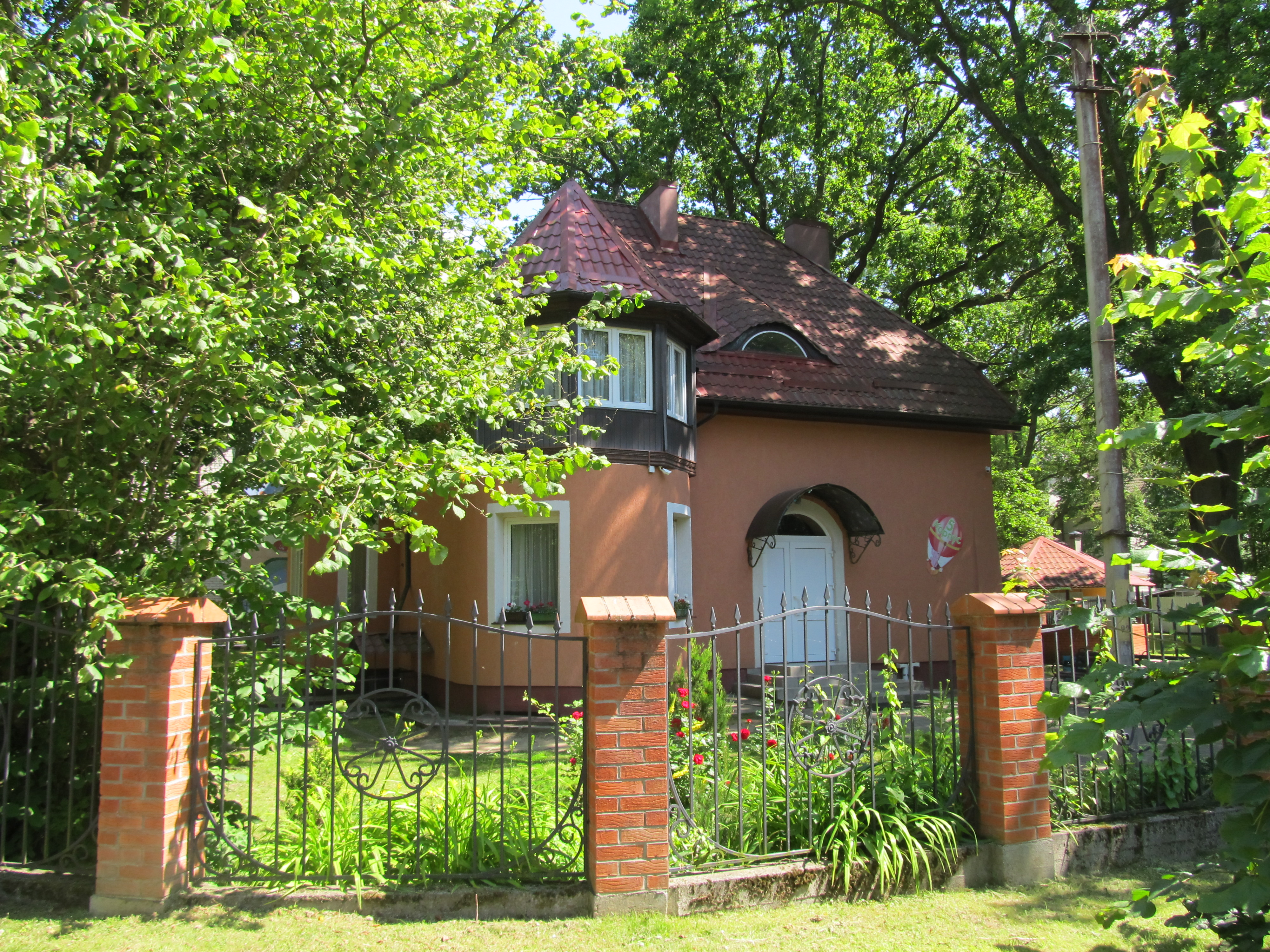 Вилла «Хельга», ныне корпус №5 детского пульмонологического санатория «Отрадное» (проспект Победы, курорт Отрадное)